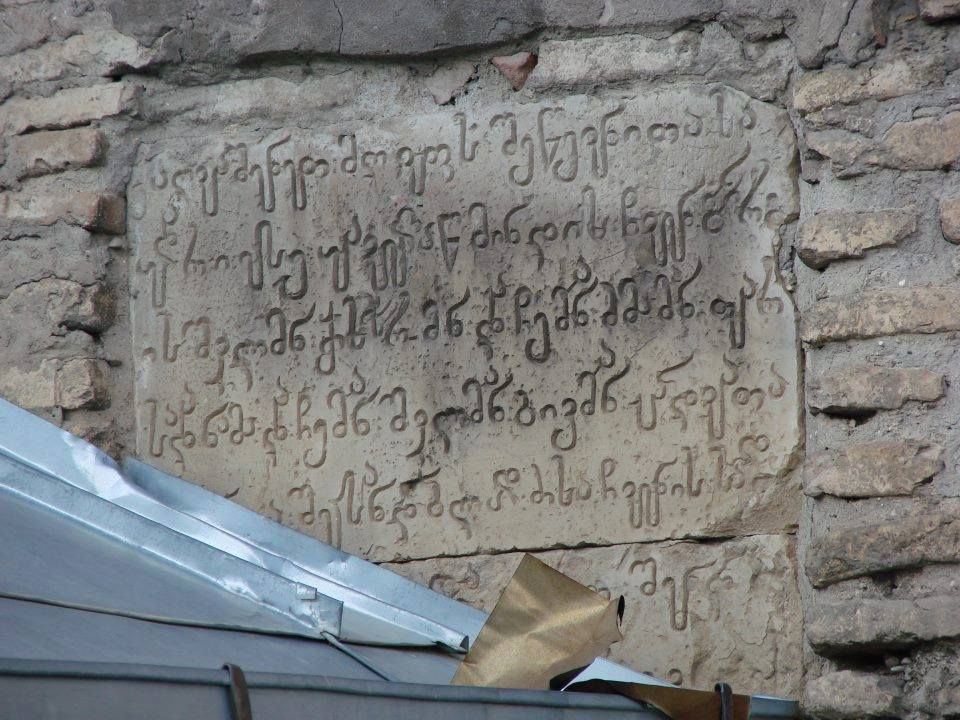 ცხინვალის ღვთისმშობლის მიძინების საკათედრო ტაძრის ქართული წარწერა